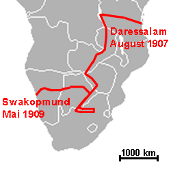 Paul Graetz’ Afrikadurchquerung per Automobil von Daressalam nach Swakopmund, 1907-1909